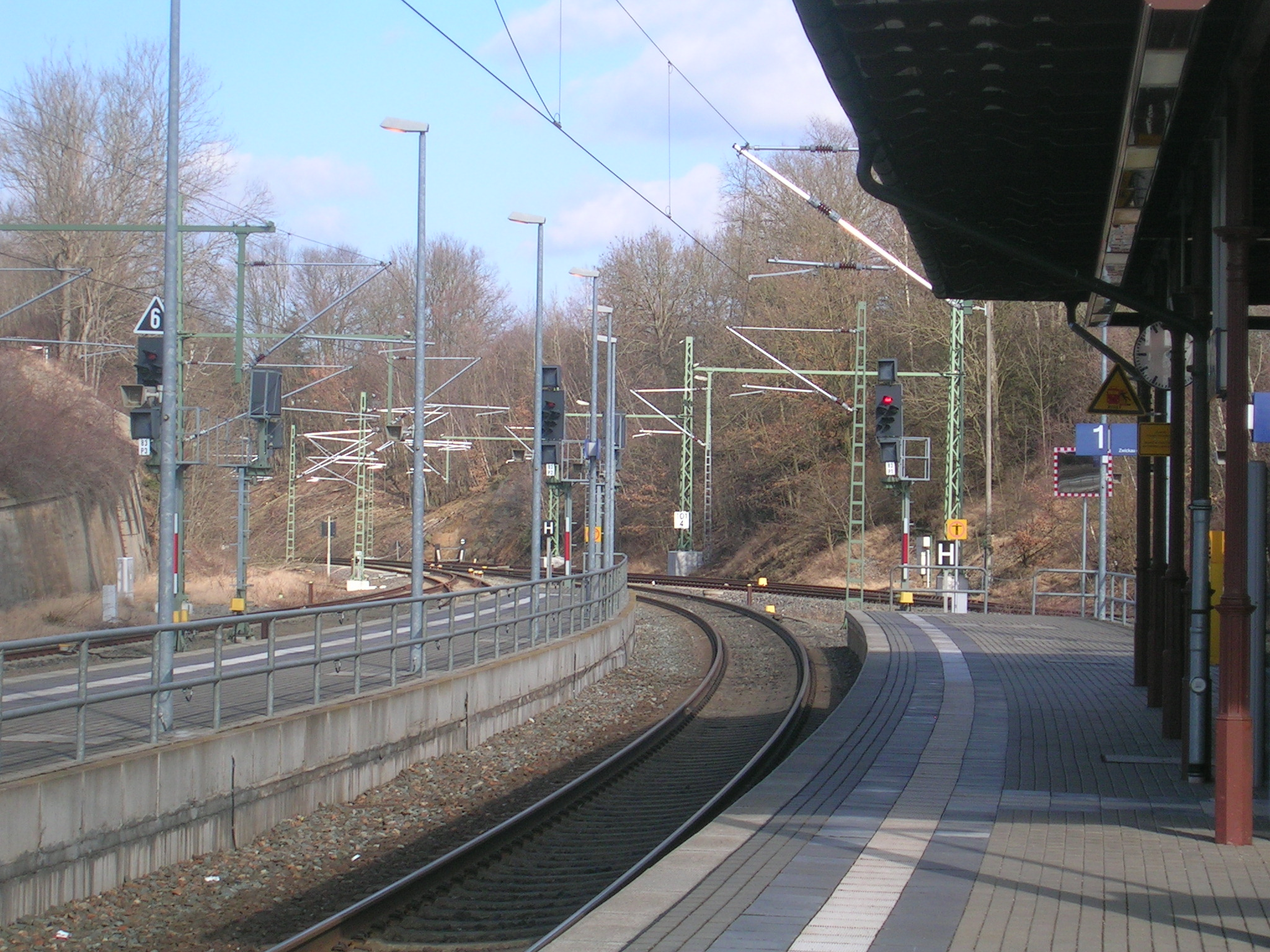 Bahnhof Herlasgrün im sächsischen Vogtland, Blick vom Bahnsteig 1 in nordöstlicher Richtung entlang der Bahnstrecke Leipzig–Hof Richtung Reichenbach und Leipzig. Die Streckenelektrifizierung war zum Aufnahmezeitpunkt im Bahnhofsbereich bereits weitgehend fertig gestellt, aber noch nicht in Betrieb genommen.